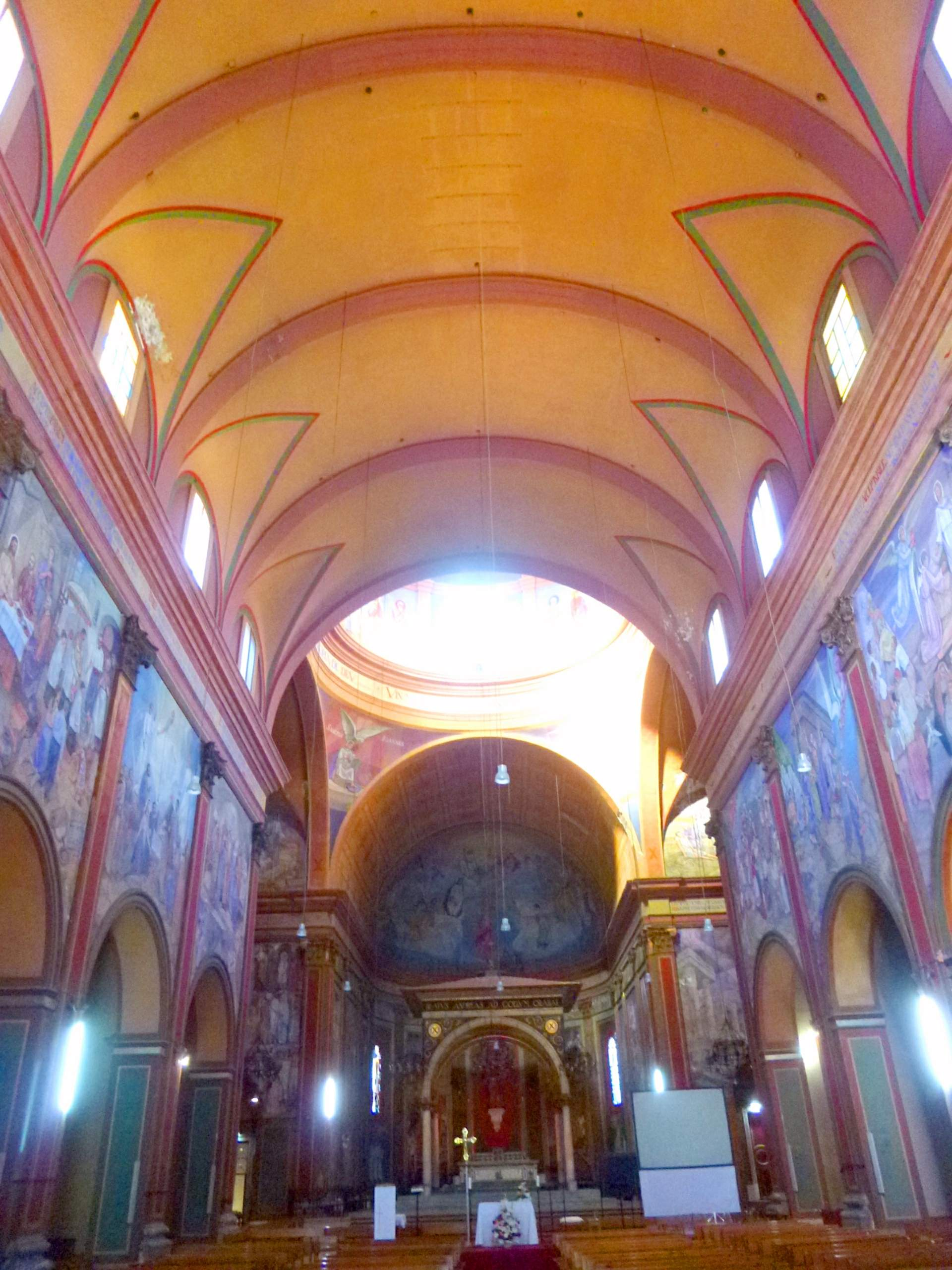 Barcelona - Iglesia de Sant Andreu del Palomar